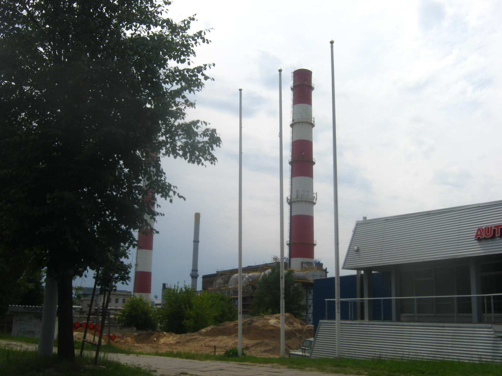 Vilnius